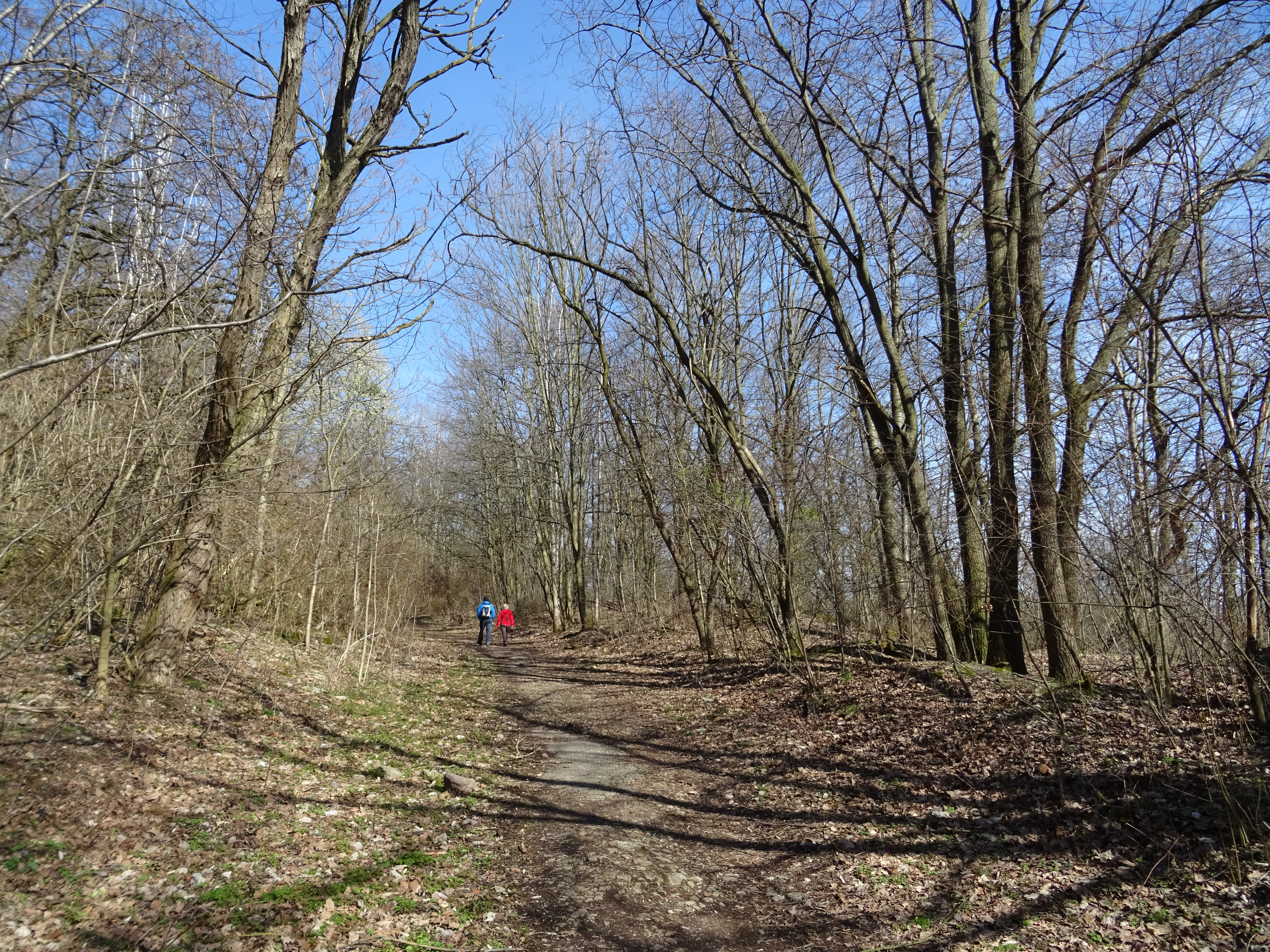 Hellerberge, Hellersiedlung am 16. März 2019, Weg Aufstieg zum Trümmerberg. Hier lagern ca. 305 der Trümmer von der im Februar bis April 1945 zerstörten Stadt.